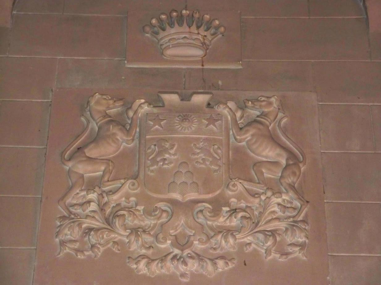 Armes de la famille Catoire de Bioncourt en bas-relief sur cheminée à Tassin (69)